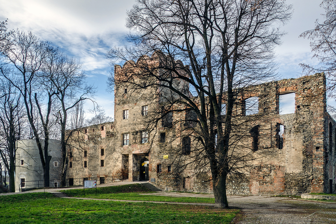 Zdjęcie wykonane po zakończeniu II etapu prac remontowych na ząbkowickim zamku, obejmujących zabezpieczenie korony murów skrzydła wschodniego i południowego oraz zabezpieczenie południowo-wschodniej bastei.